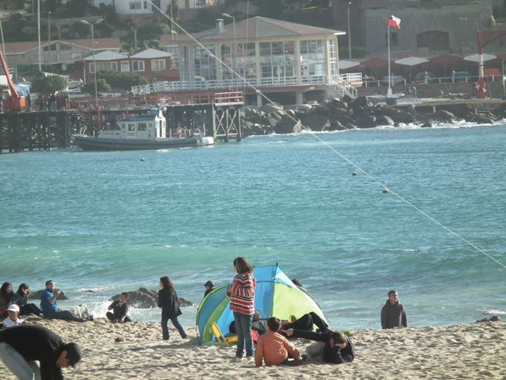 Una patrullera costera de la Marina de Chile Clase Defender atracando en el Muelle. Atras el Club de yates El Quisco